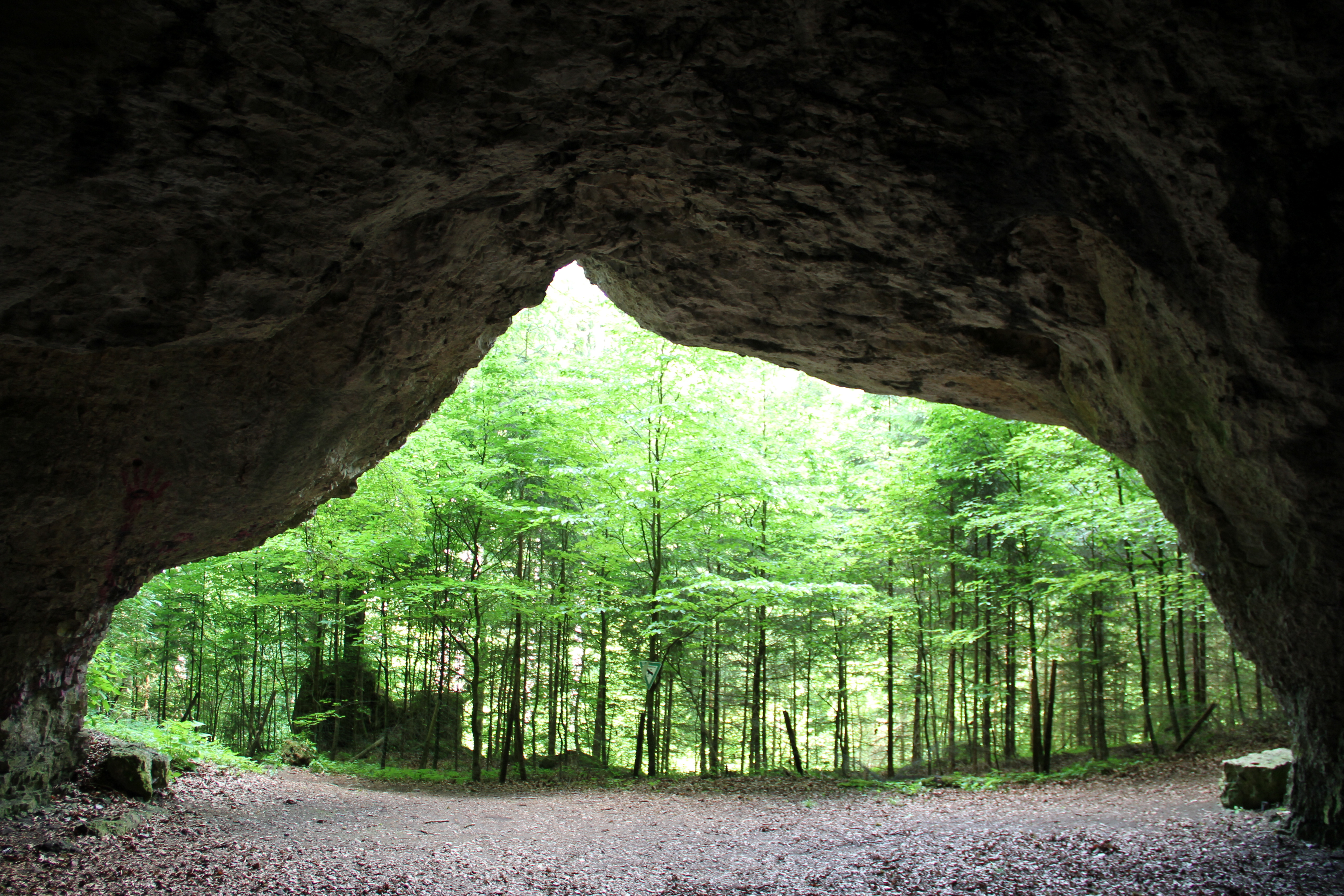 Andreaskirche, Eingang von innen